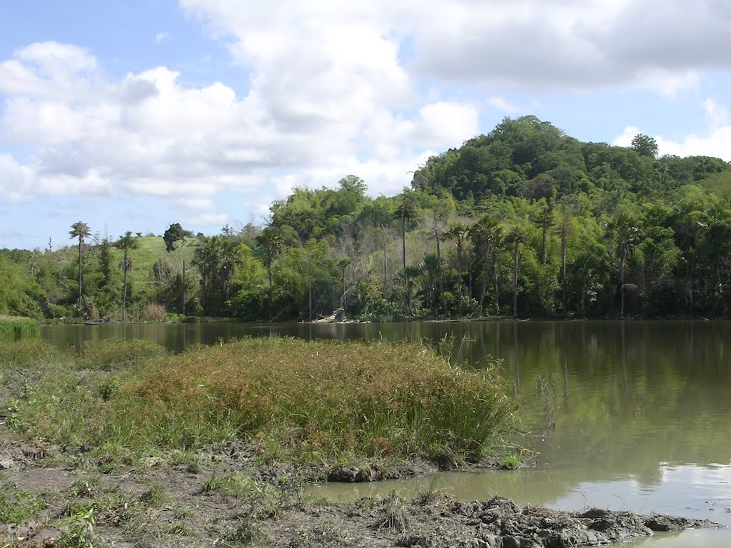 Lake Welada view, suco Clacuc, subdistrict Fatuberlio, Manufahi